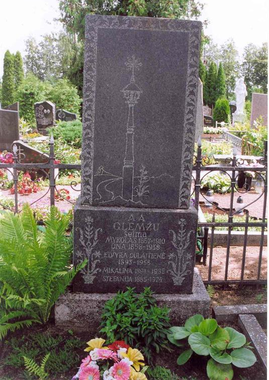 Glemžų šeimo kapas Kupiškio miesto kapinėse